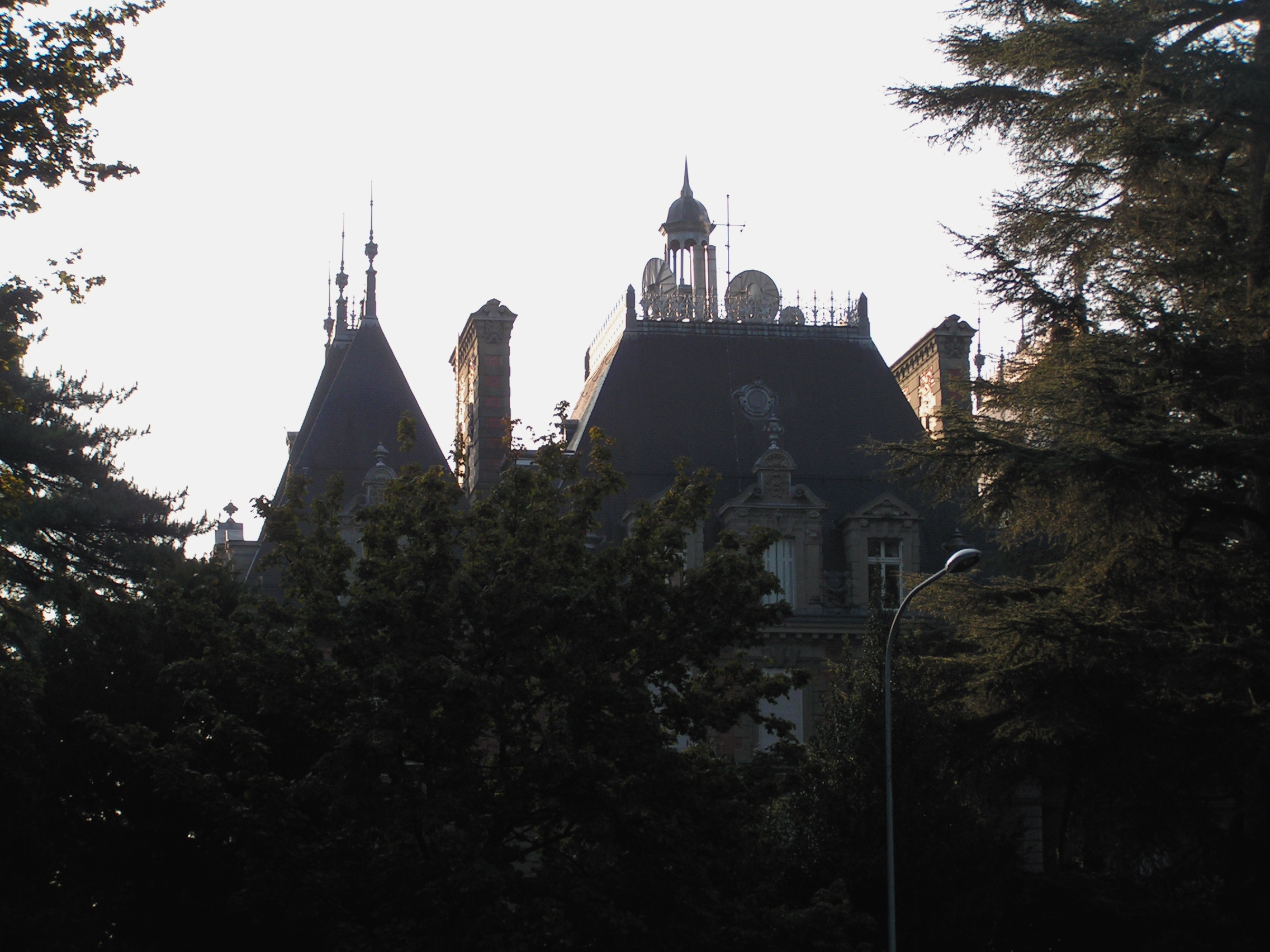 Route de Lausanne 398, Versoix. Villa Bartholony (Sans Souci). Détail toiture.